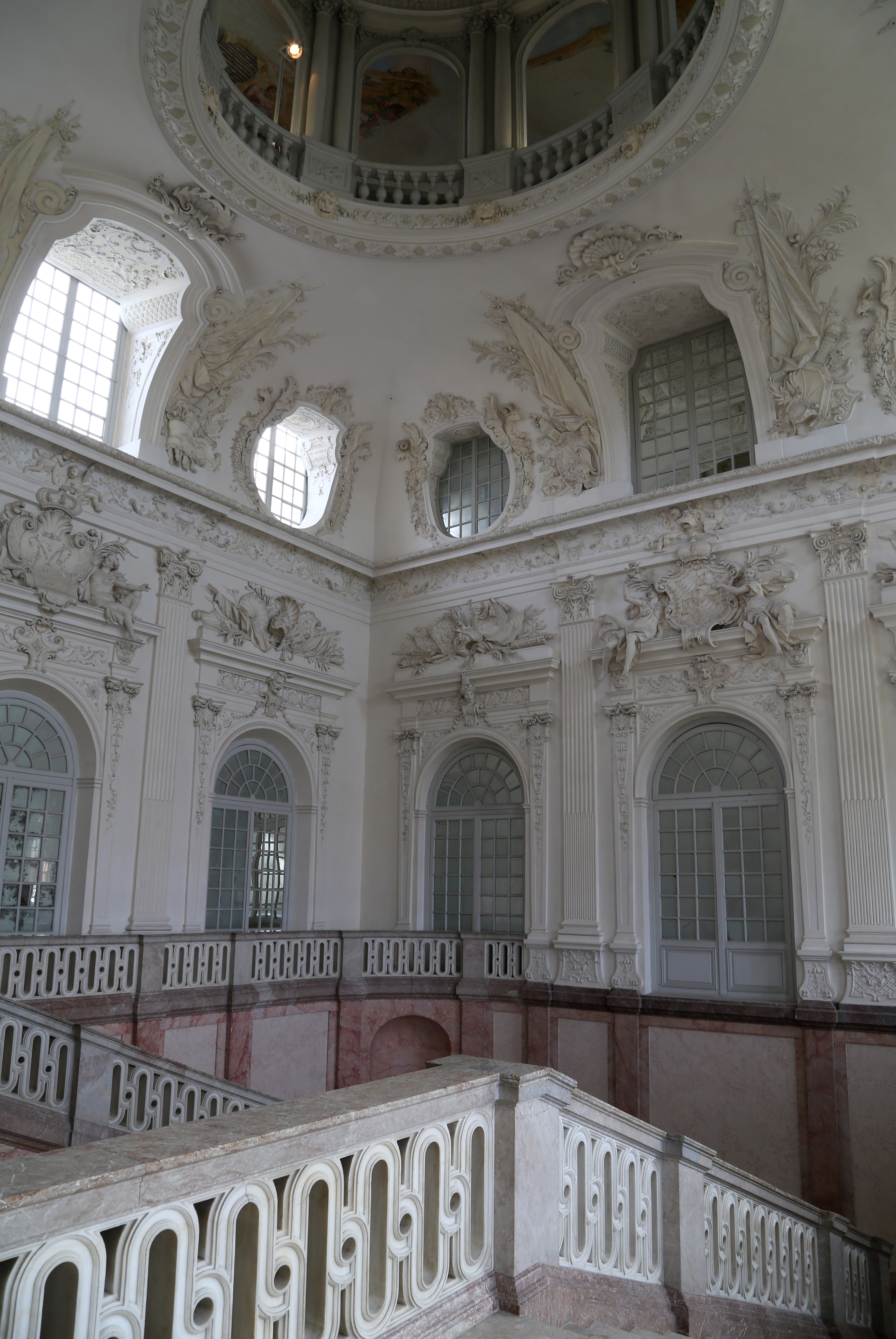 Treppenhaus, Neues Schloss Schleißheim